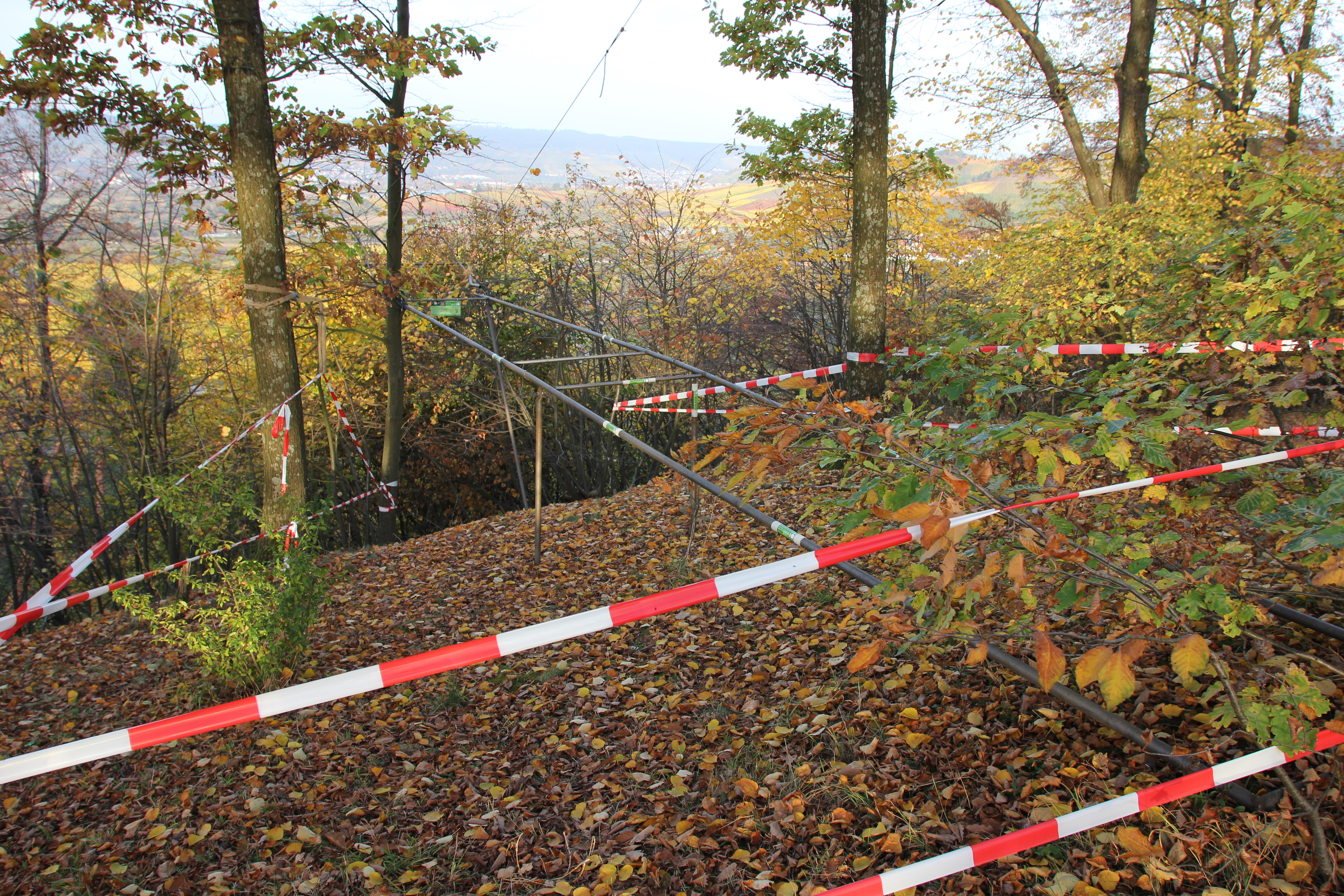 Flächenhaften Naturdenkmal „Sieben Linden“ in Kernen-Stetten: Gerüst zur Demonstration, wo sich der Schlaich-Steg befinden soll.